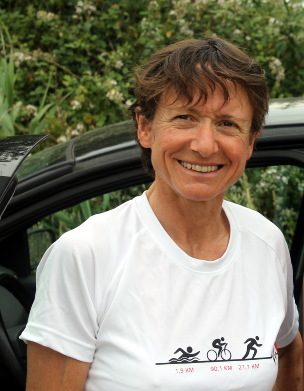 Cathy Houseaux Ventouxman 2017